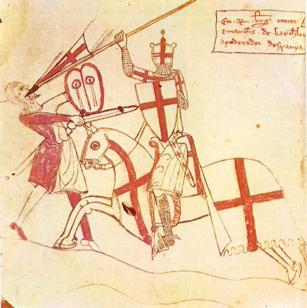 El conde de Barcelona (inscripción: «En · R(amon) · Berenguer · comte · e march(e)s · de · Barch(e)lona · apoderador · d'Espanya») con escudo, sobreveste, yelmo, pendón, gualdrapas y vaina de la espada con el emblema de la cruz llana de gules en campo de plata atribuidas como armas personales. Miniatura del primer tercio del siglo XIV en la edición de los Usatges de Barcelona conservada en el manuscrito Z-III-14 de la Biblioteca del monasterio de El Escorial.Fuente de la información: Alberto Montaner Frutos, El señal del rey de Aragón: Historia y significado, Zaragoza, Institución «Fernando el Católico», 1995, p. 132, fig. 20. ISBN 84-7820-283-8.